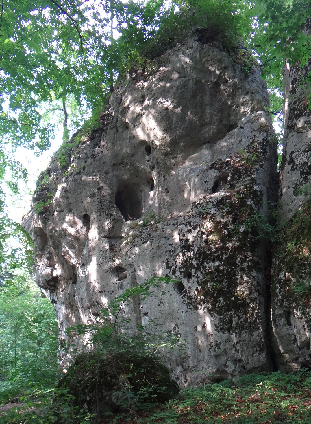 Skała 7 Projektów w Parku Jurajskim w Smoleniu